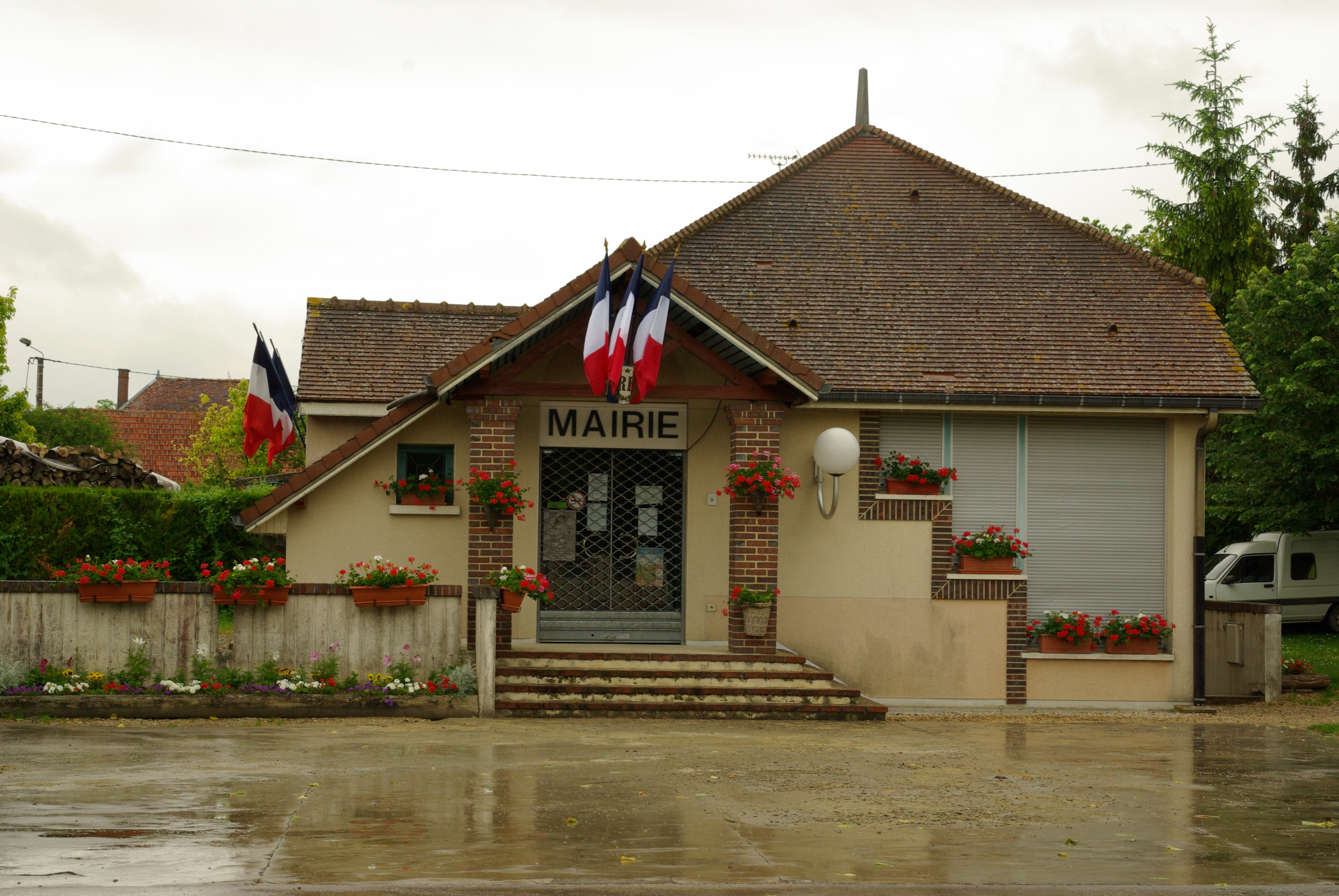 Mairie de Torcy-le-Grand (Aube)